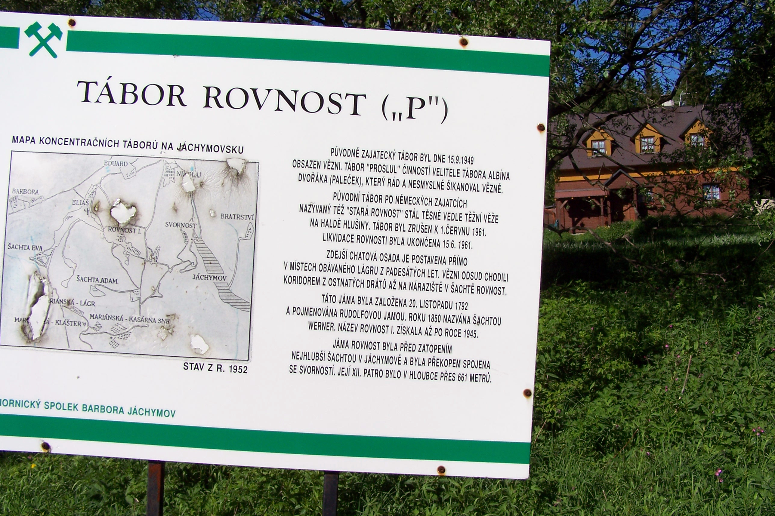 Bývalý pracovní tábor Rovnost – původní tabule naučné stezky Jáchymovské peklo.